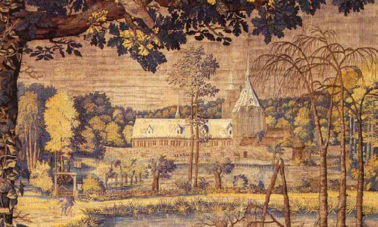 Description: Le Rouge-Cloître détail de tapisserie n°5 Les Chasses de Maximilien vers 1540 - Musée du Louvre, Paris